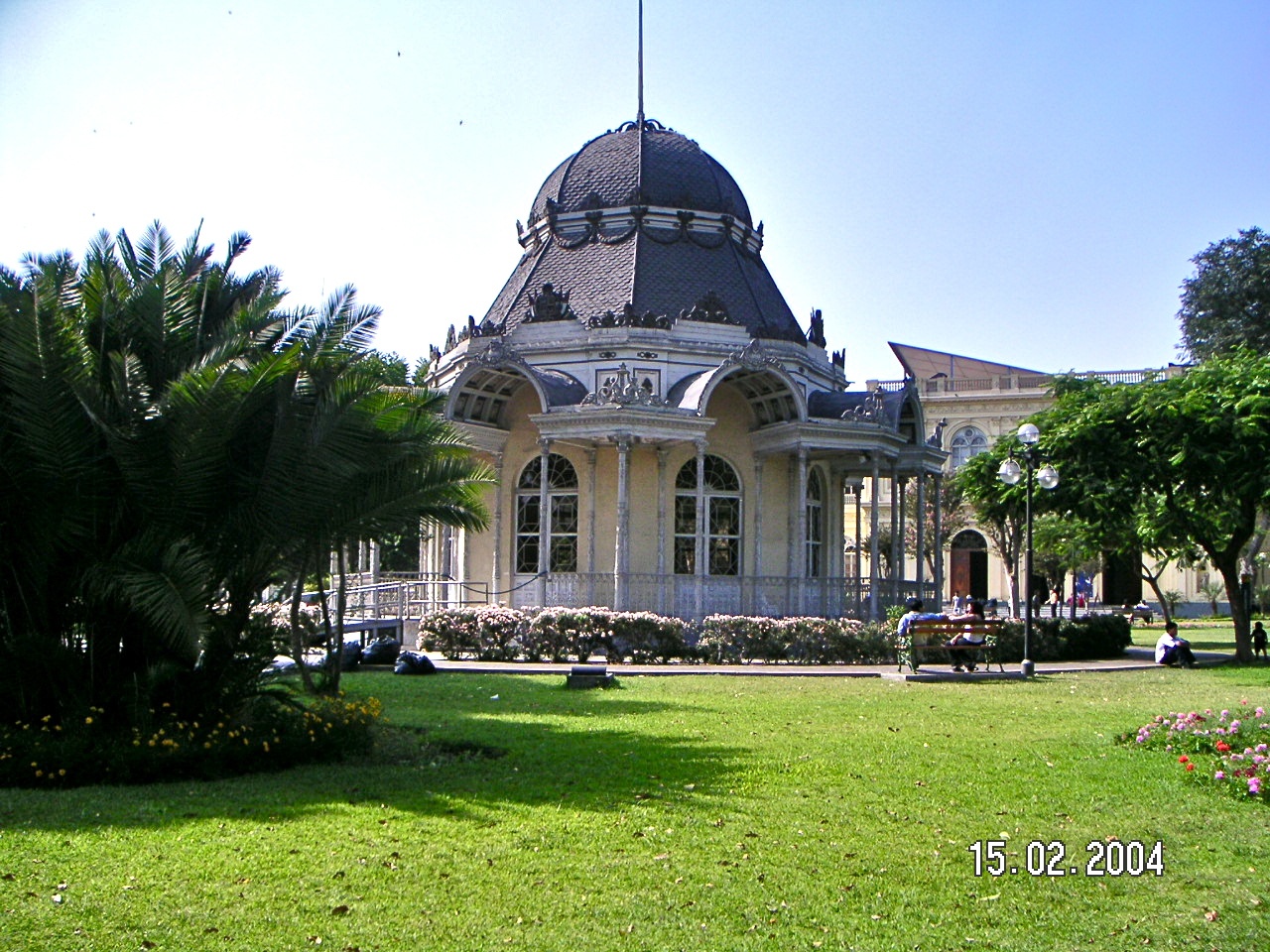 Lima